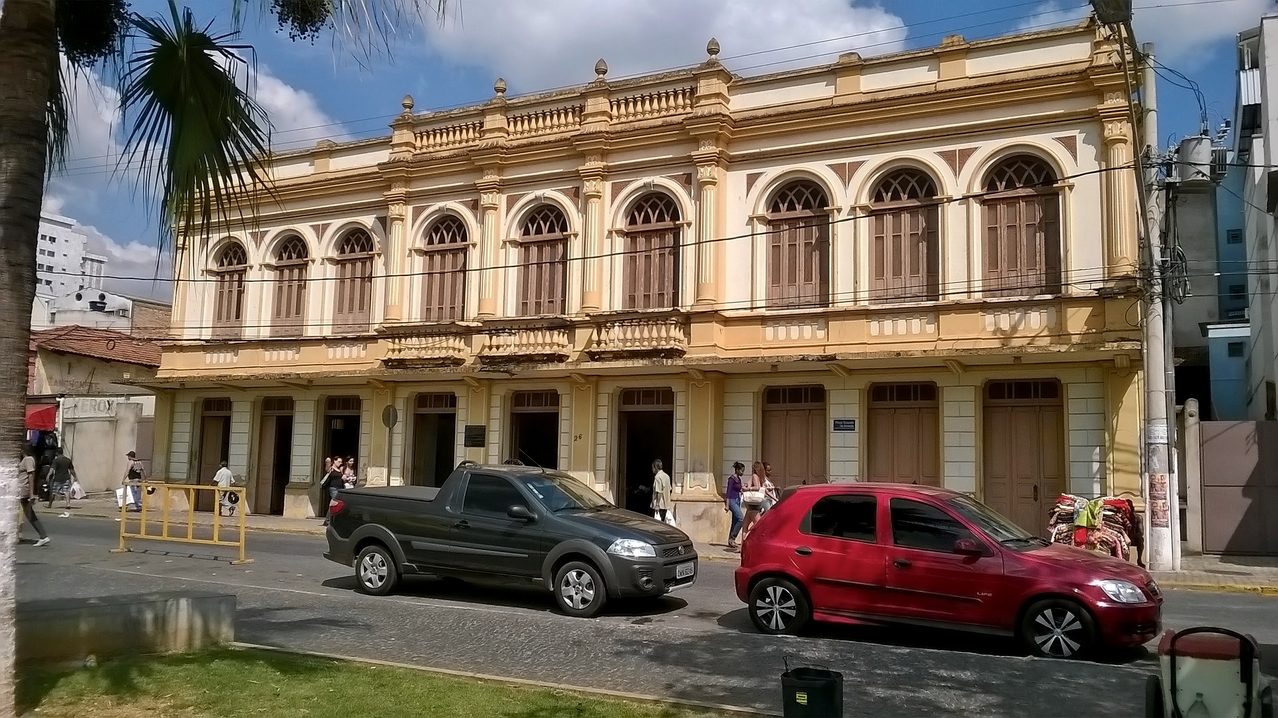 Casa do Cultura, localizado na cidade de Pará de Minas, Minas Gerais.